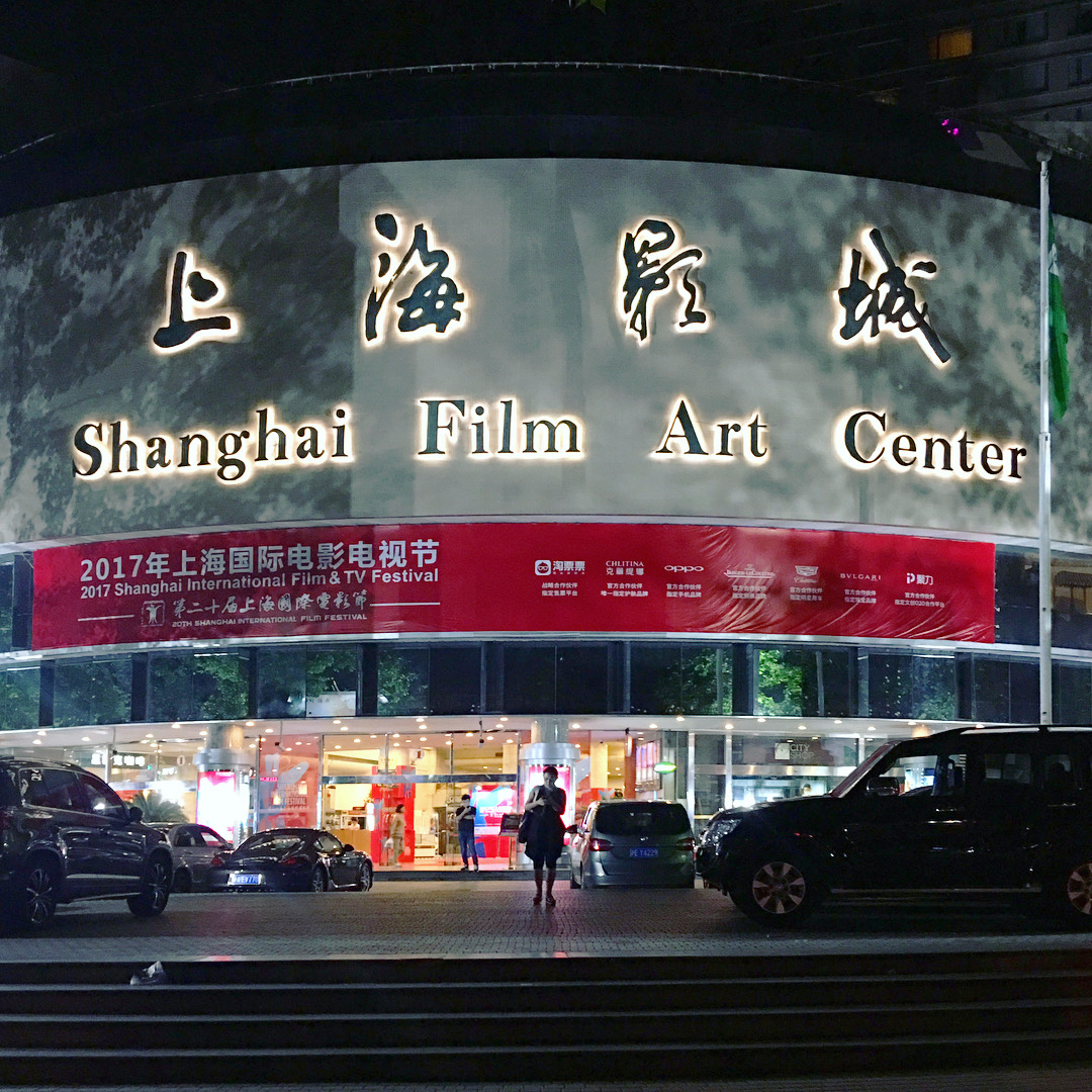 Shanghai film center appearance from outside shot in Jun 2017 in Shanghai.jpg